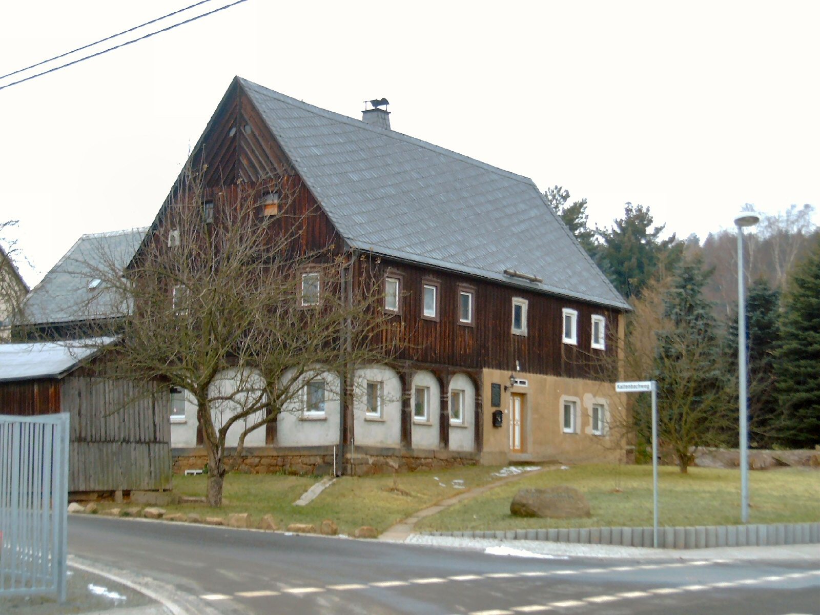 Geburtshaus von August Matthes in Wehrsdorf, Dresdener Straße 51